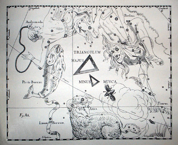 Tavola AA del terzo volume "Firmamentum Sobiescianum, sive uranographia" dell'opera "Prodromus Astronomia" di Johannes Hevelius, pubblicato nel 1690 a Danzica. La tavola riproduce le costellazioni "Triangulum Majus, Minus et Musca" dell'Emisfero Boreale.